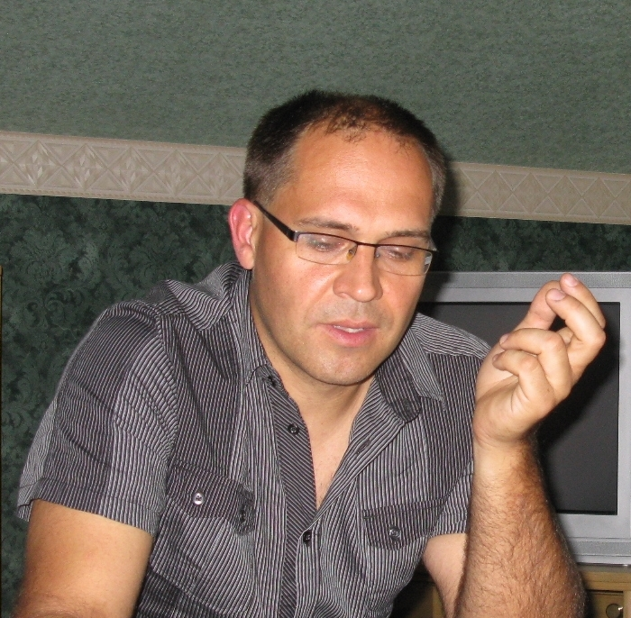 Kirjandusteadlane Andrus Org taasiseseisvumispäeva eelsel kirjandusseminaril, 19. august 2012